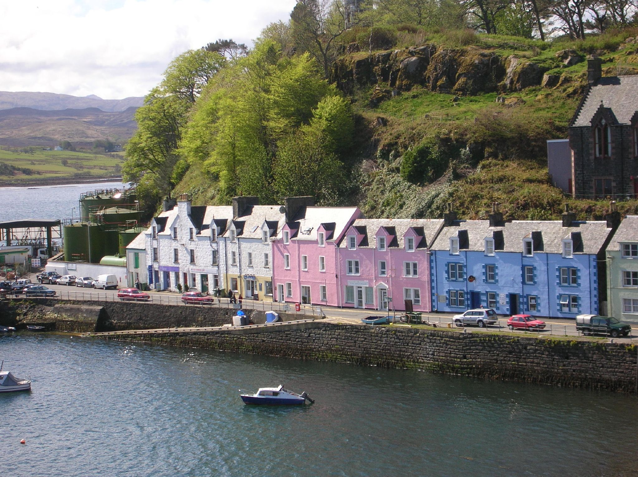 Camping Spring \ Summer 2006